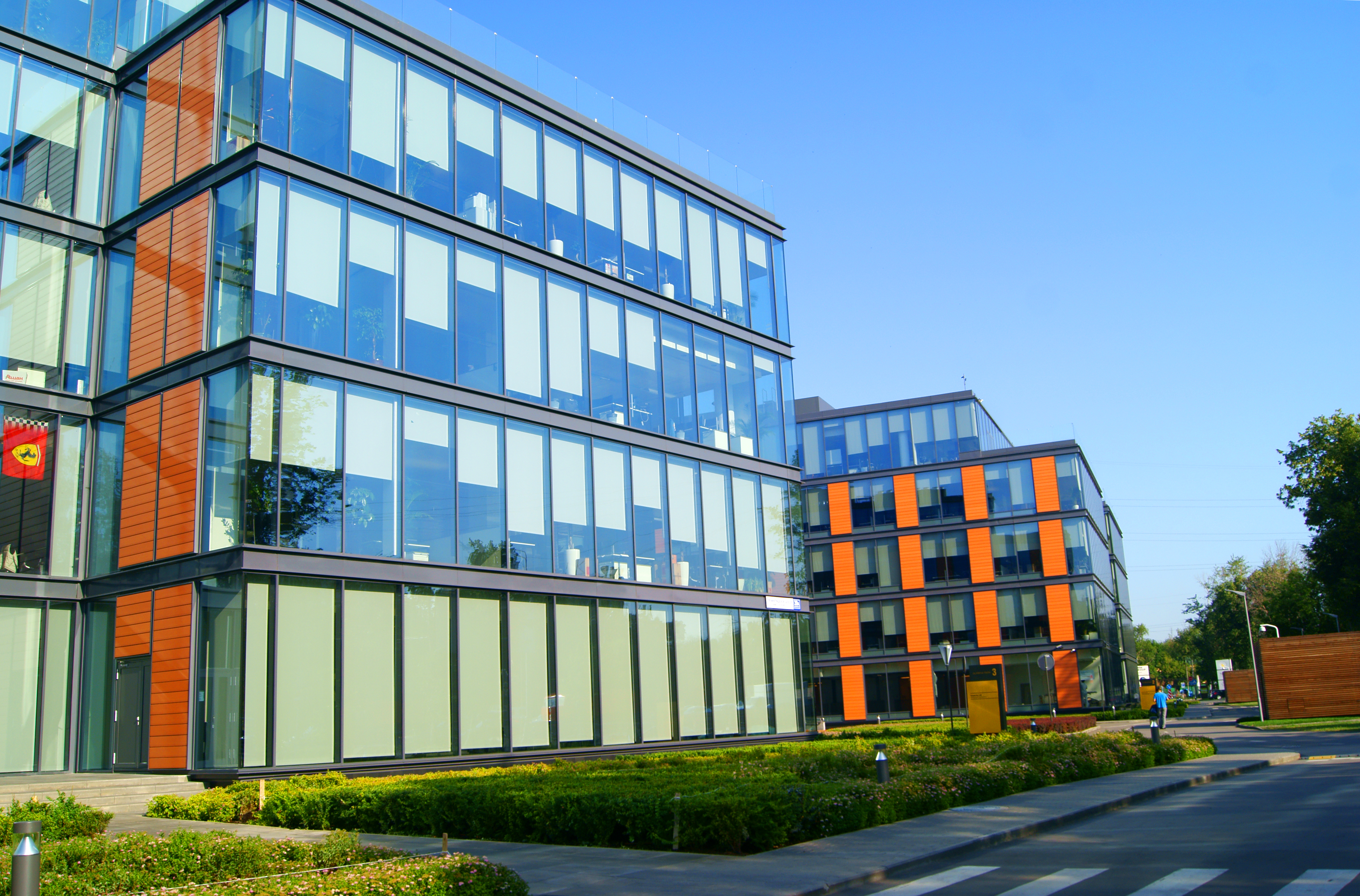 Главный офис Tele2 Россия (Москва, Ленинградское шоссе, д. 39А, стр. 1, бизнес-центр «Олимпия Парк»)